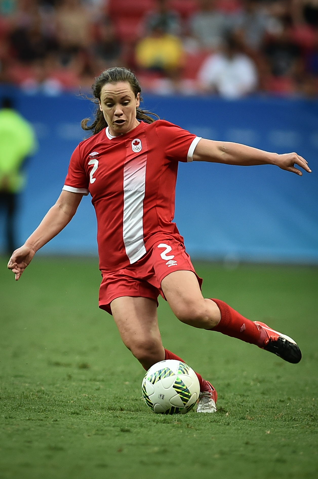 Estádio Nacional de Brasília Mané Garrincha, Brasília, DF, Brasil, 9/8/2016 Foto: Andre Borges/Agência Brasília Alemanha e Canadá jogam nesta terça-feira (9), no Estádio Mané Garrincha, pelo grupo F do futebol feminino nas Olimpíadas 2016.